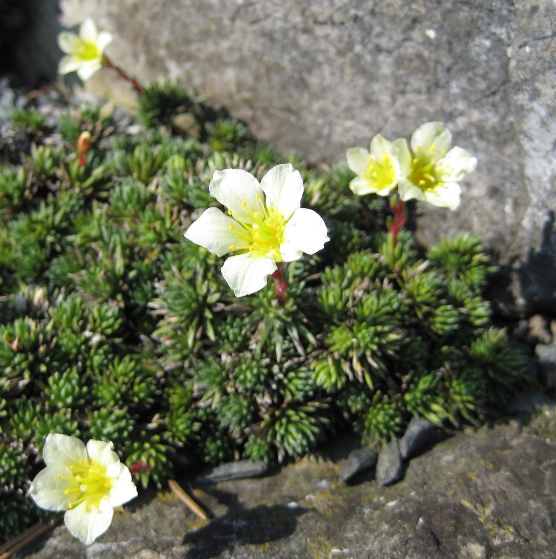 Saxifraga burseriana im Botanischen Garten Dresden